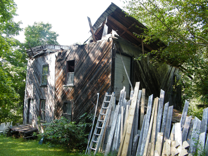 Moulin Beaudet de Saint-Antoine-de-Tilly (Chaudière-Appalaches), au Québec. En 1995, les mécanismes ont été vendus au moulin du Petit-Pré, à Château-Richer. Moulin à eau, moulin à farine.